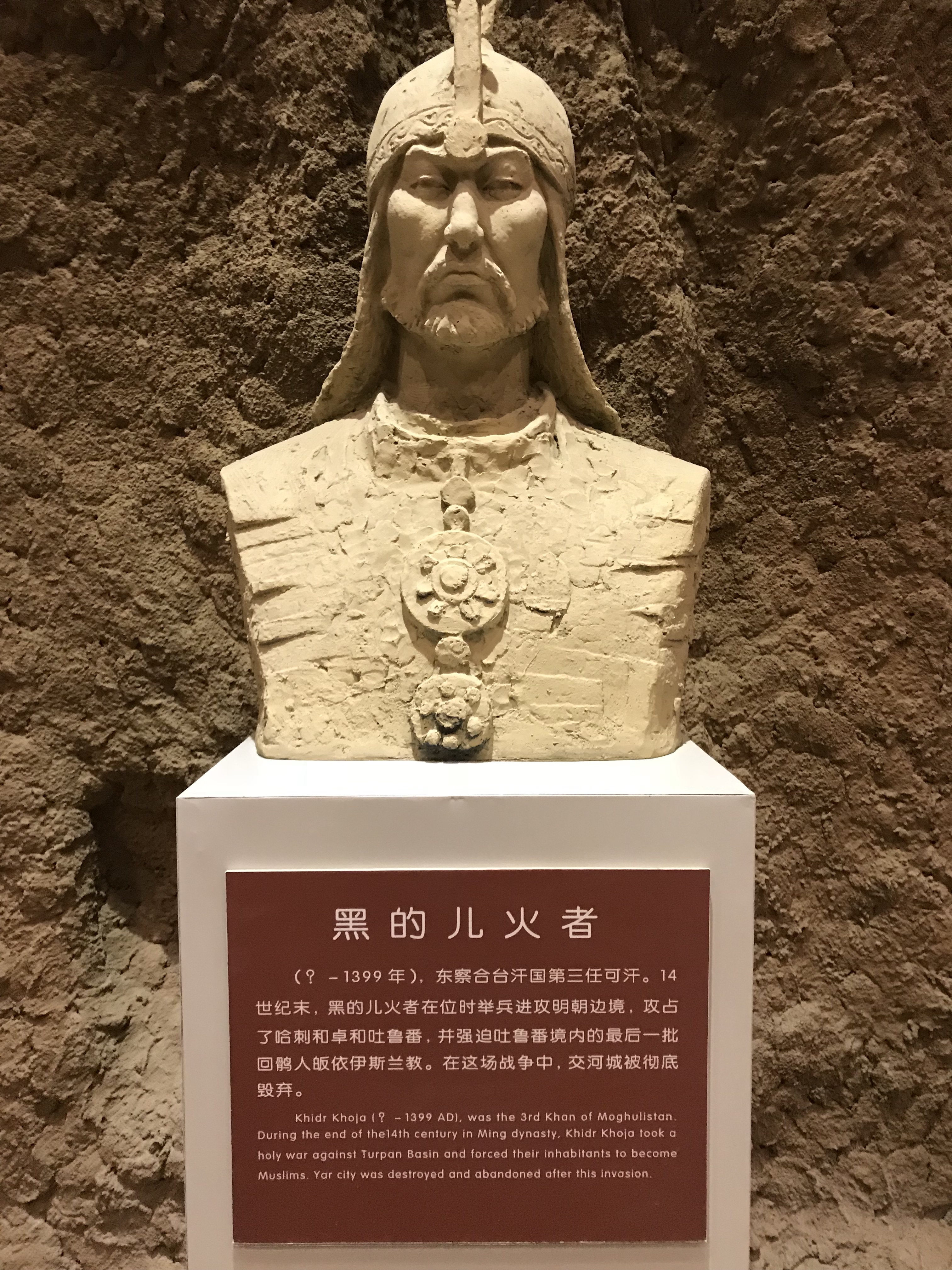 拍摄于交河故城旅游区